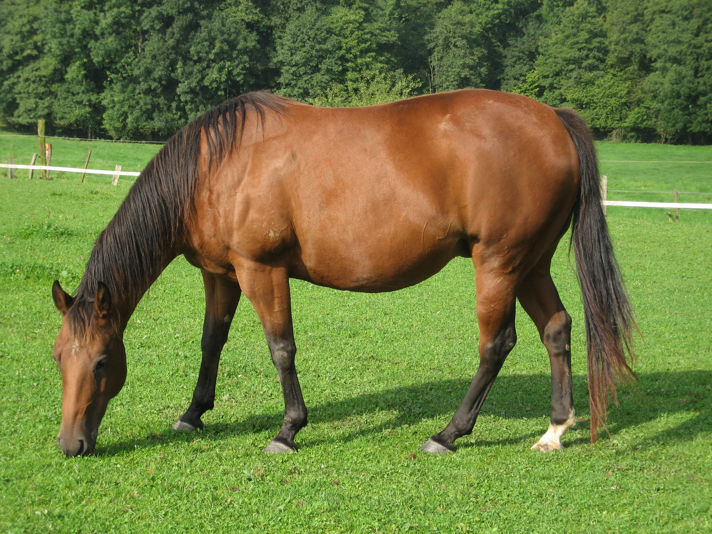 Quarter Horse 23 / 08 / 2008